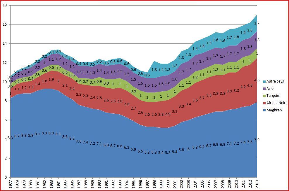 Part des naissances de mères nées hors d'Europe ex Urss.(Données Insee 1977-2013)